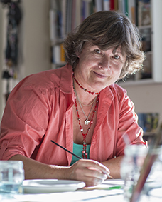 Foto: Gustav Kaiser 2013